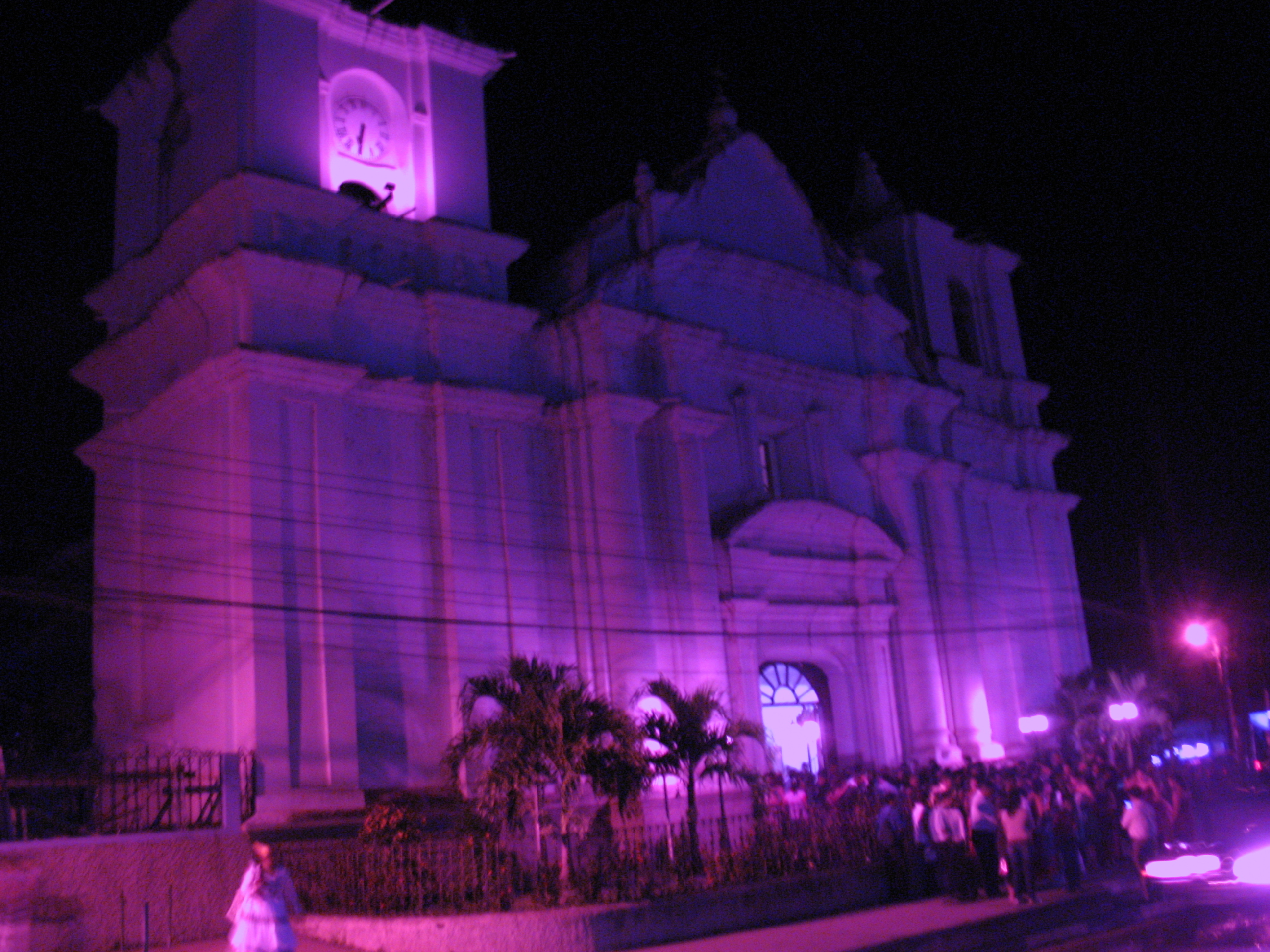 Iglesia Catolica Principal de Juticalpa Frente al Parque Central. Olancho. Photo by : Dennis Garcia.